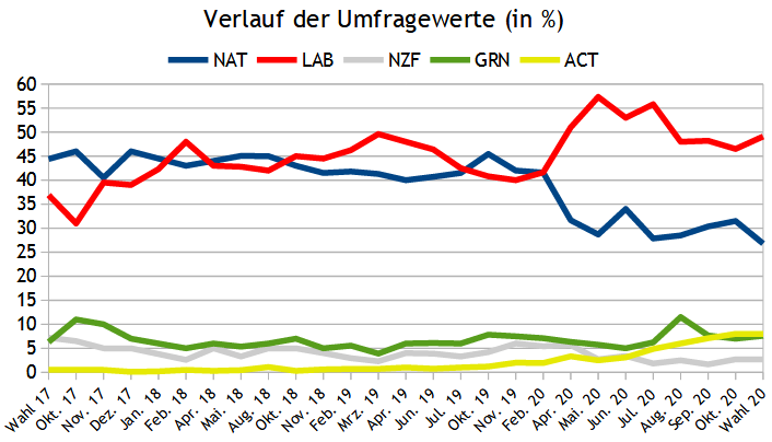 Umfragen zur Parlamentswahl in Neuseeland 2020